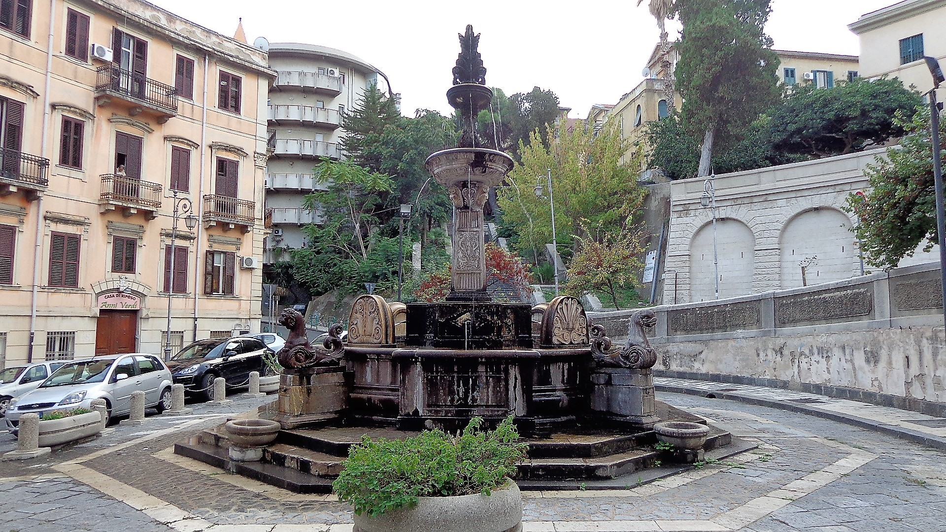 Fontana